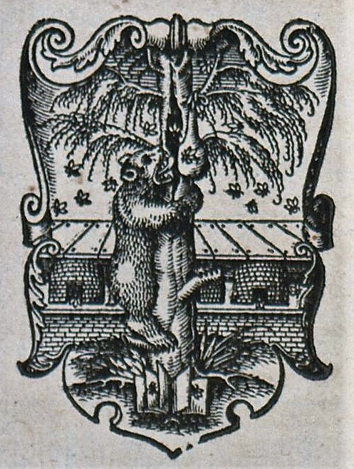 Druckerzeichen von Samuel Apiarius, aus dem Titelblatt von: Des hoch gelerten/ vnnd weit berümpten Herren/ D. Theophrasti Paracelsi Büchlin von der Tinctura Physica, Basel: Perna 1570 (Universitätsbibliothek Bern, MUE AD 97 : 2)